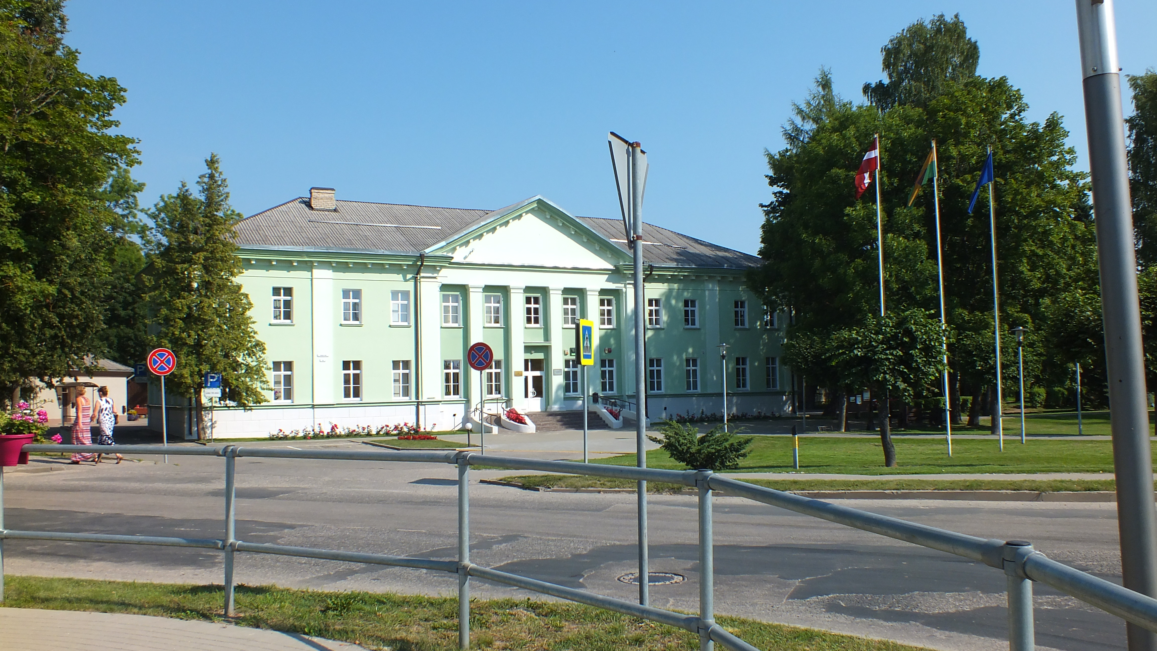 Dagdas novada dome